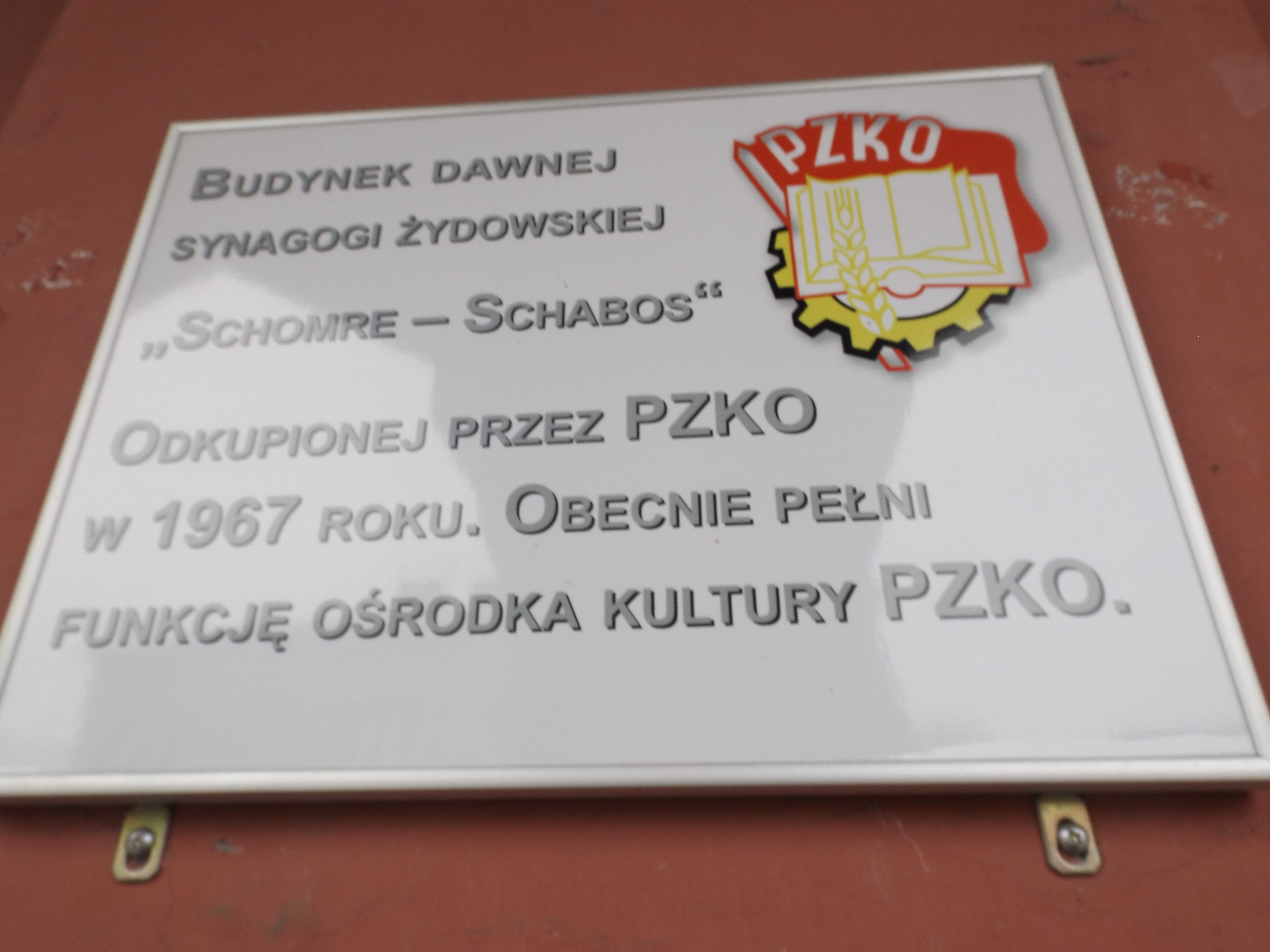 Sign in front of synagogue in Český Těšín